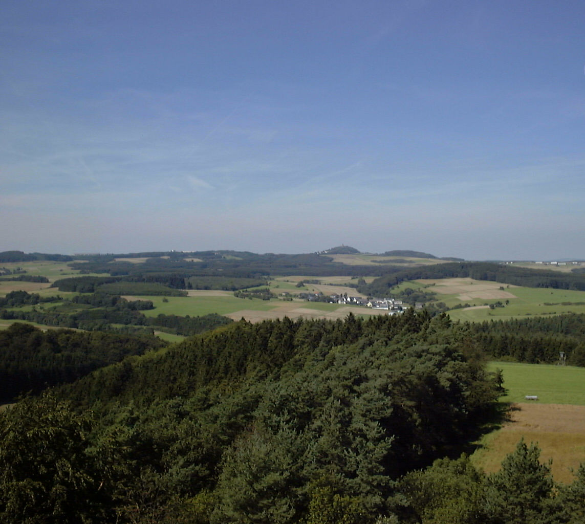 Blick über die Eifel auf die Nürburg Fotograph: Walter Koch Aufnahmedatum: 1.9.2004 Lizenz: GNU-FDL 16:22, 2. Okt 2004 Walter Koch 640 x 480 (47066 Byte) (Blick über die Eifel auf die Nürburg)